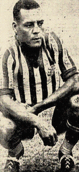 Ladislau Antônio da Guia, ou simplesmente, Ladislau da Guia, nascido em, 27 de Junho de 1906 no Rio de Janeiro, falecido em 31 de outubro de 1988, no Rio de Janeiro. Foi um futebolista brasileiro. Na época da foto (circa 1940), jogava pelo Bangu Atlético Clube (Rio de Janeiro, RJ, Brasil)